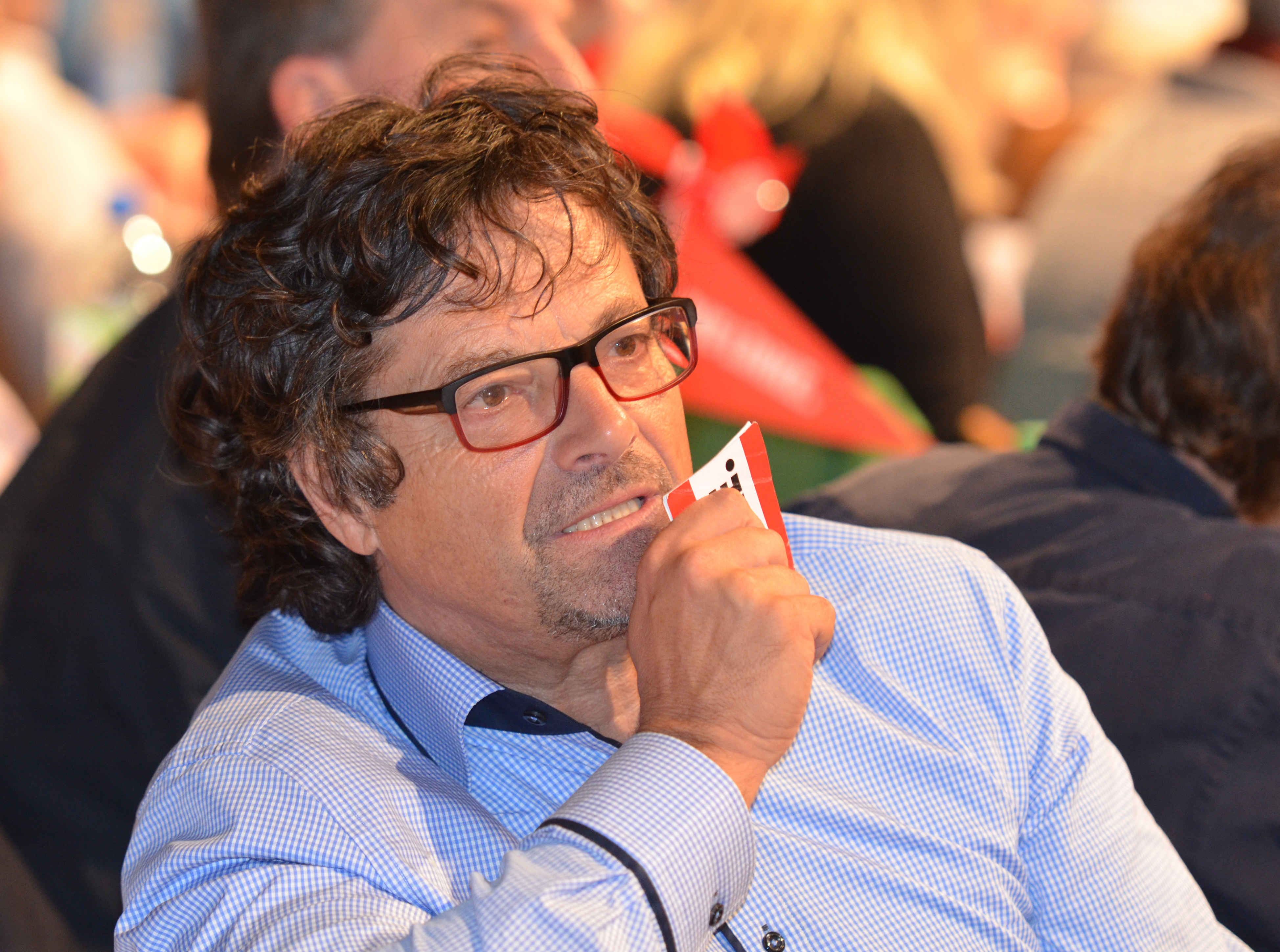 Bundesparteitag DIE LINKE Mai 2014 in Berlin, Velodrom Diether Dehm